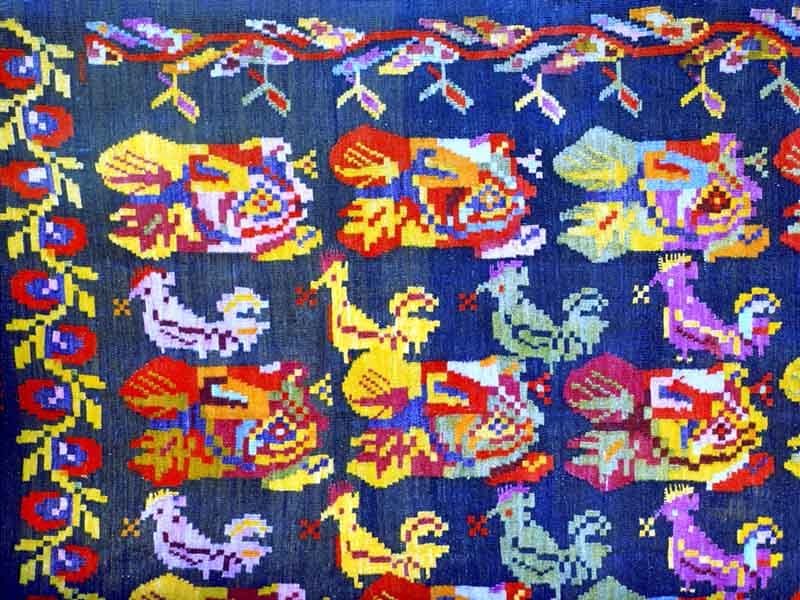 Moldovan carpet - 2 (1985).